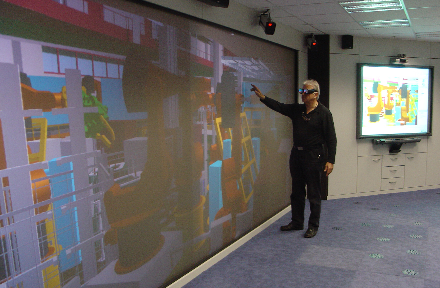 Das Bild stammt aus dem Bildarchiv der TMP-Mediagroup